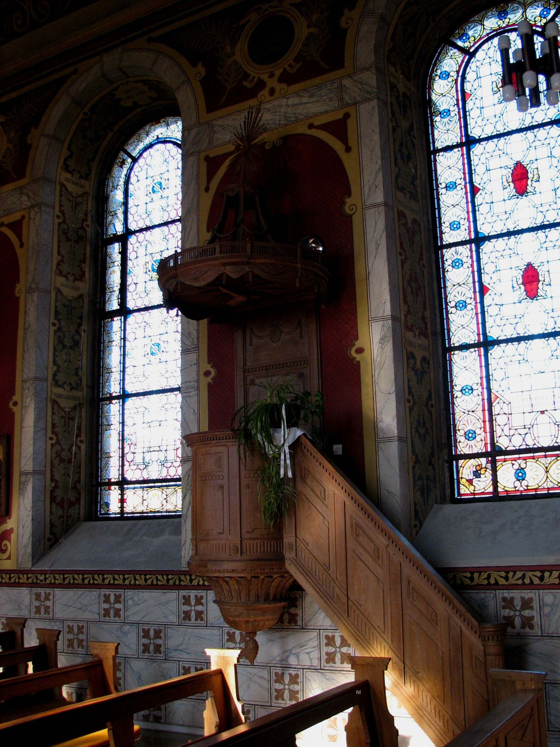 Innenraum mit Kanzel der Kirche St. Maria Magdalena in Effeln